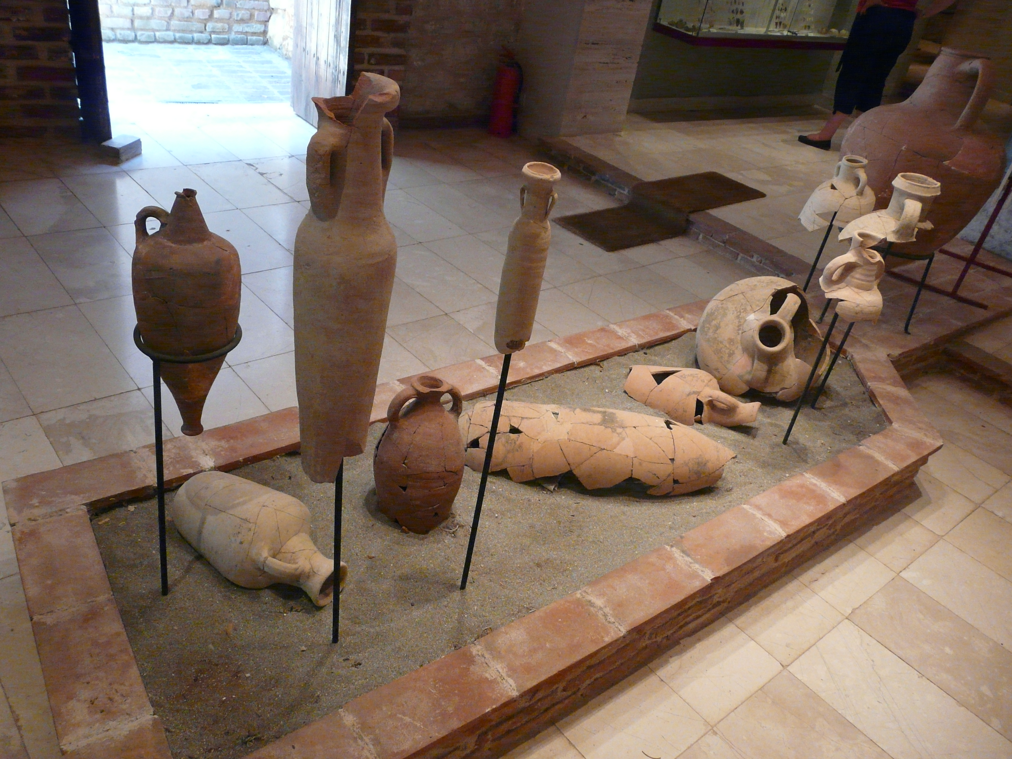 Corfu-Albania trip. Museum